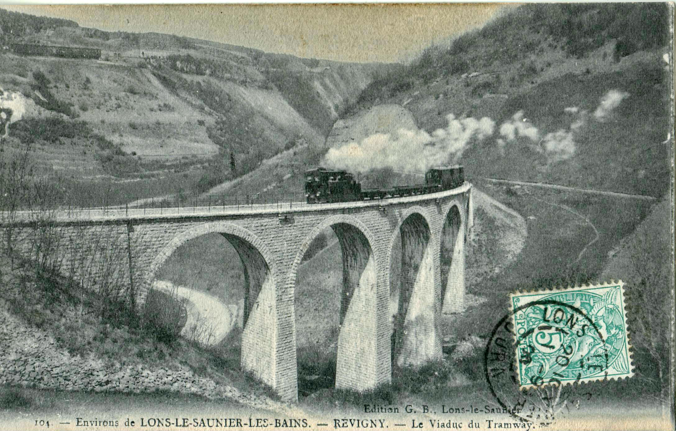 Carte postale ancienne éditée par G. B. à Lons-le-Saulnier, collection Environs de LONS-LE-SAULNIER-LES-BAINS, n°104 : REVIGNY - Le Viaduc du Tramway